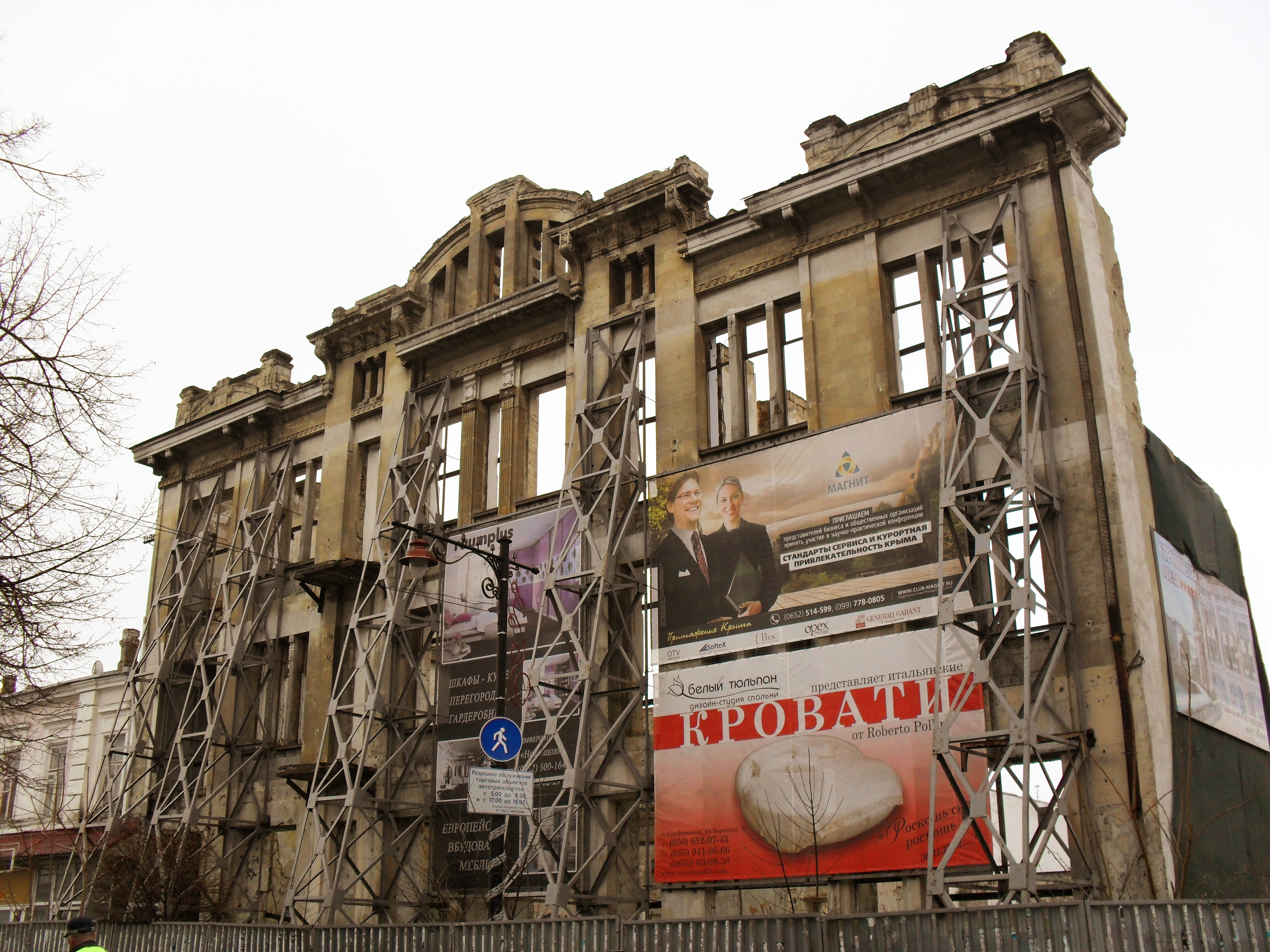 Колишній готель "Асторія". ул Маркса, 16 (Симферополь)